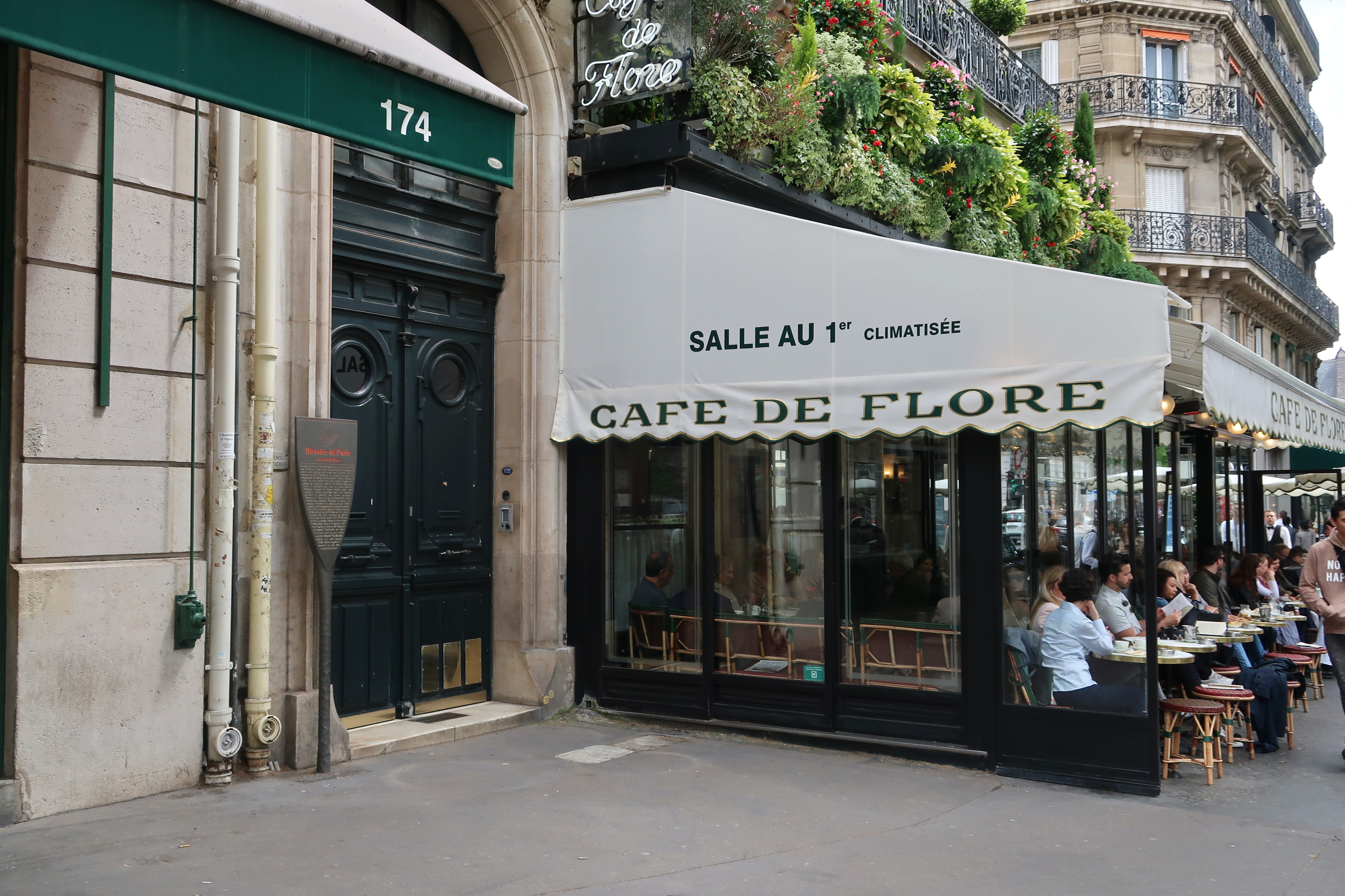 Panneau Histoire de Paris en hommage au café de Flore, 172 boulevard Saint-Germain (Paris, 6e).